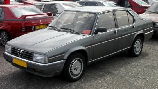 Alfa Romeo Alfa 90